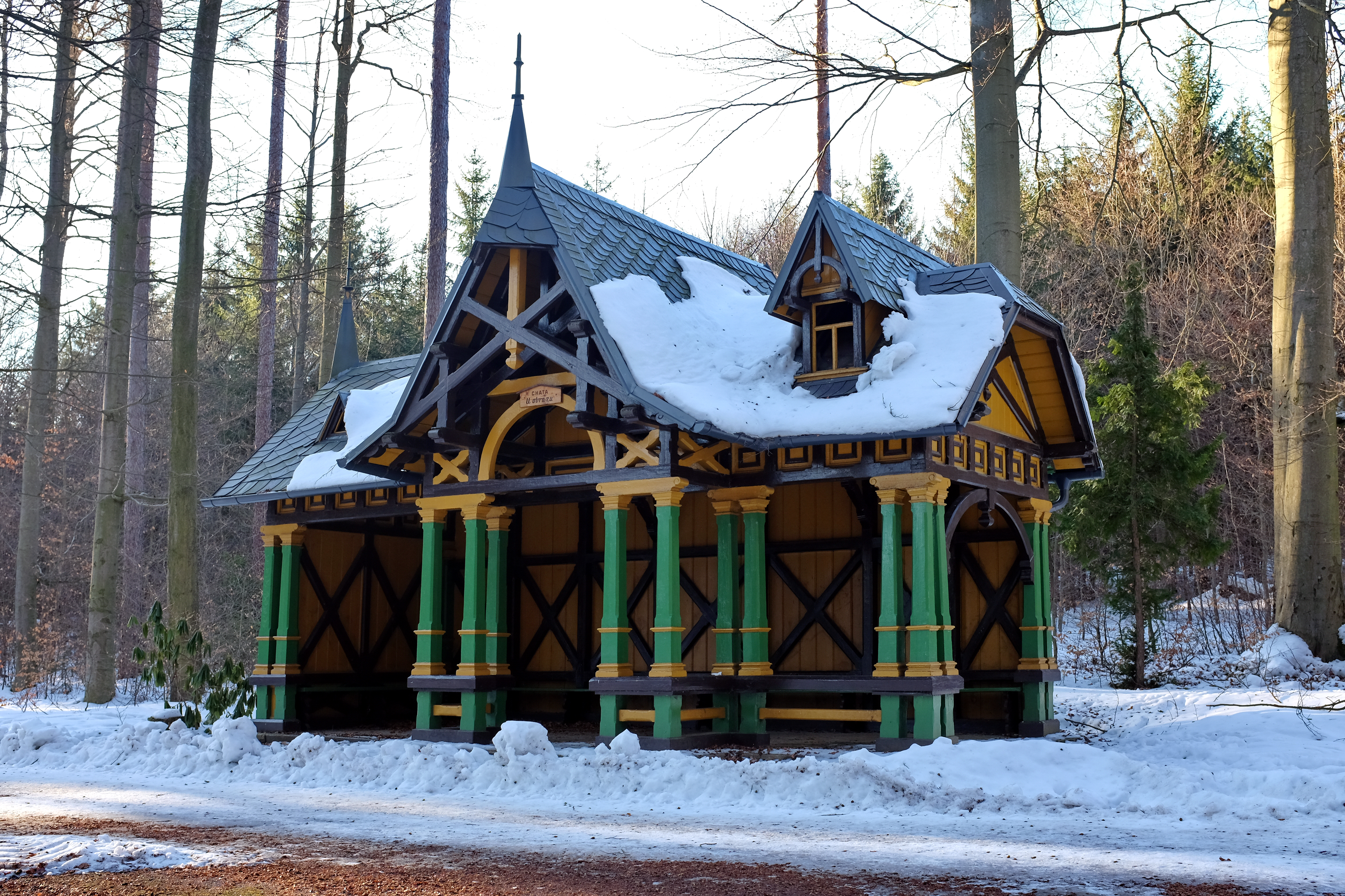 Altán U obrazu, karlovarské lázeňské lesy